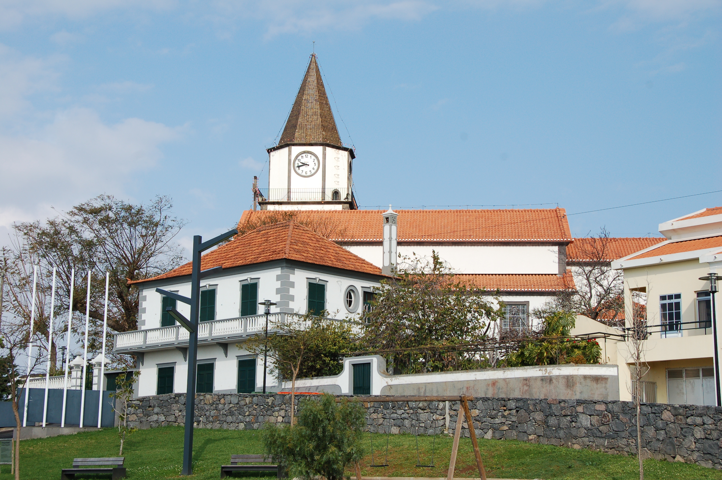 Vista do centro do Estreito da Calheta